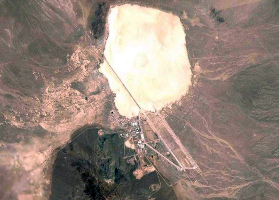 Landsat-7-Aufnahme der NASA aus World Wind